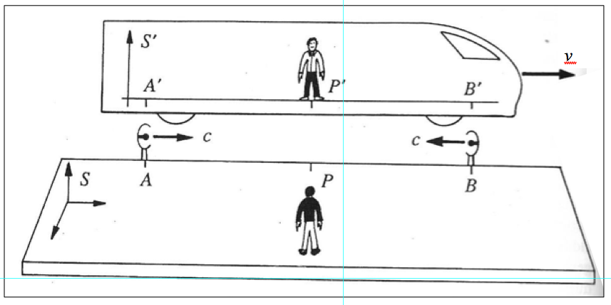 Sistema desberdinetako aldiberekotasunak adierazteko esperimentu mentalaren eskema.